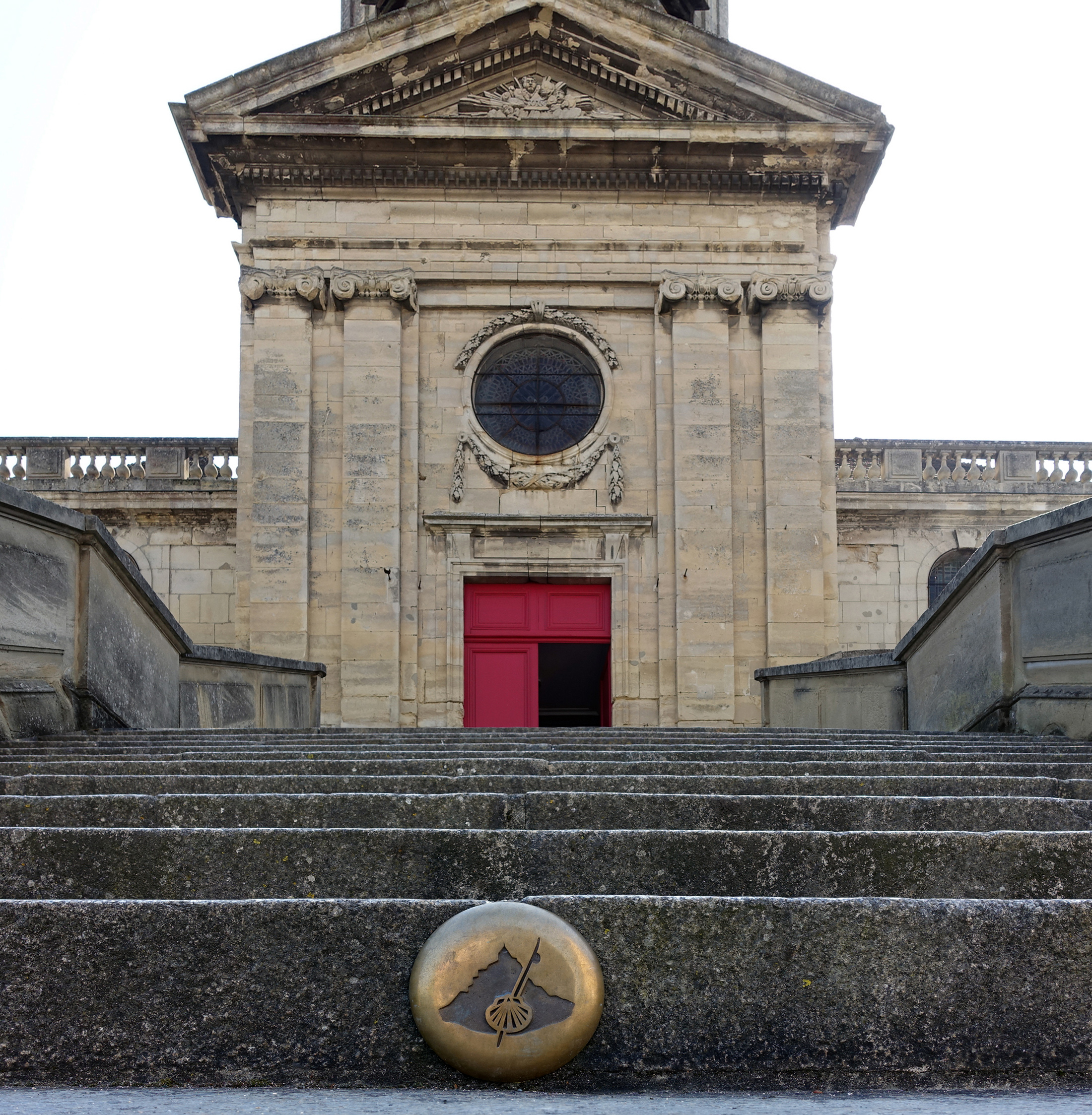 Saint-Michel de Vaucelles (Caen, Normandie) : parvis, escalier extérieur, balise marquant le début du chemin du Mont Saint-Michel (chemin de Caen).